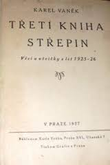 Karel Vaněk Třetí kniha střepin 1927 Titel